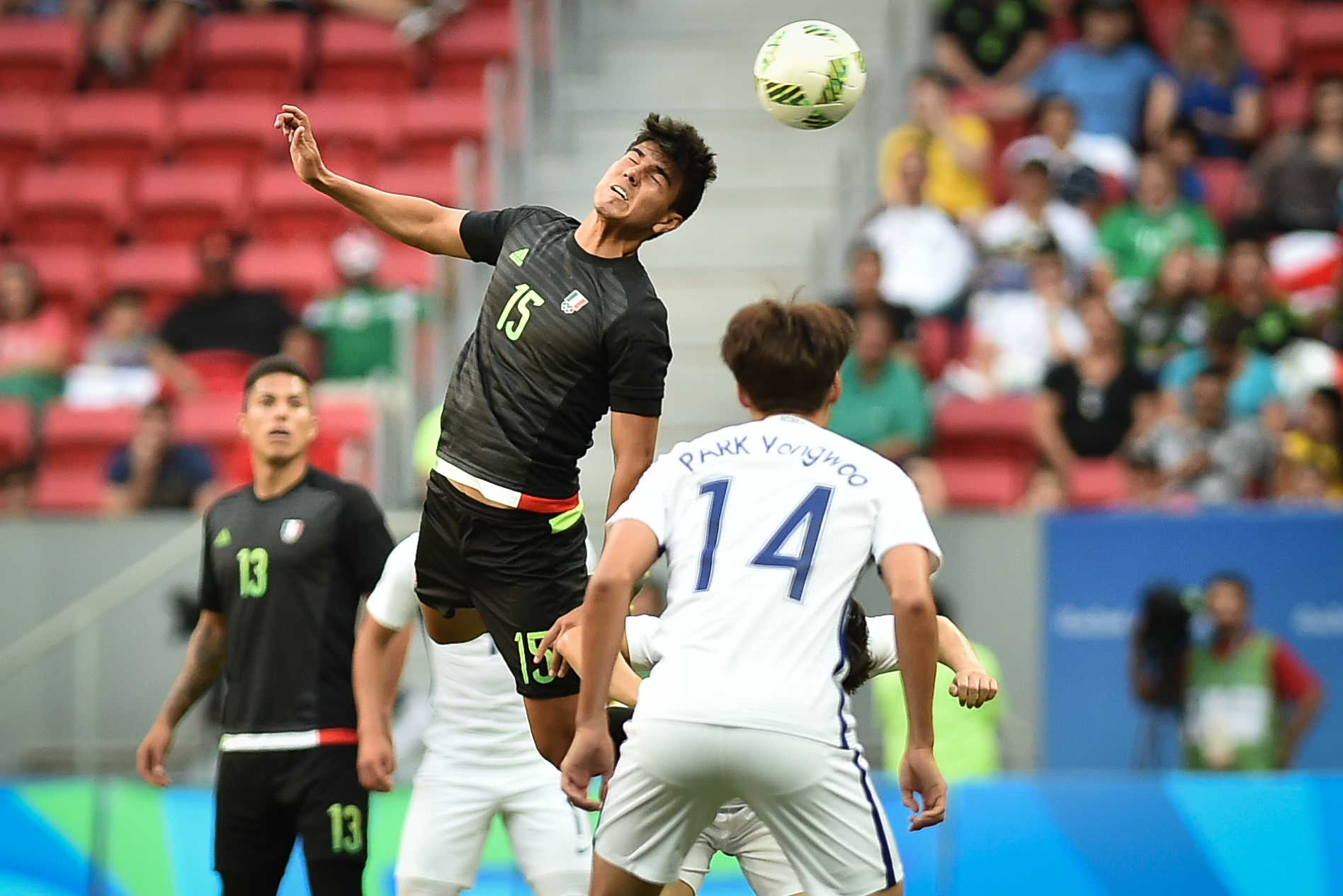 Estádio Nacional de Brasília Mané Garrincha, Brasília, DF, Brasil, 10/8/2016 Foto: Andre Borges/Agência Brasília. O time da Coréia do Sul classificou-se para a próxima fase do torneio de futebol masculino da Olimpíada com uma vitória por 1 a 0 contra o México. Kwon Chang-hoon marcou o gol da vitória sul-coreana aos 32 minutos do segundo tempo.